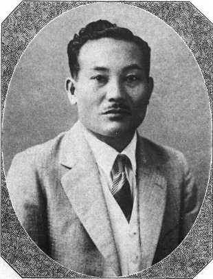 東前豊（1893-1974）